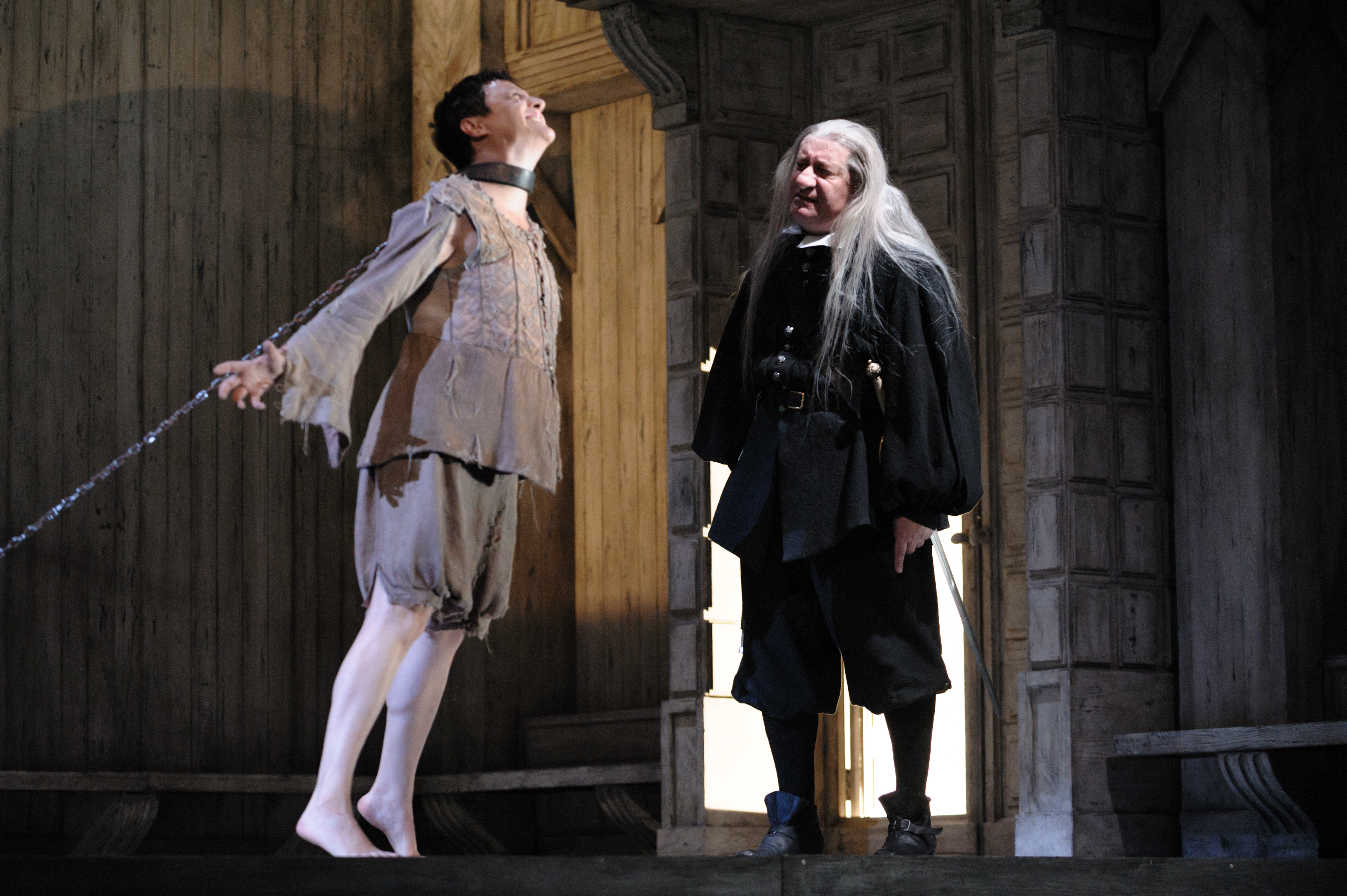 La vida es sueño. 35 edición del Festival de Teatro Clásico de Almagro. Datos de la obra Título: La vida es sueño Autor: Calderón de la Barca Versión: Juan Mayorga Dirección: Helena Pimenta Cía: Compañía Nacional de Teatro Clásico Foto: Guillermo Casas